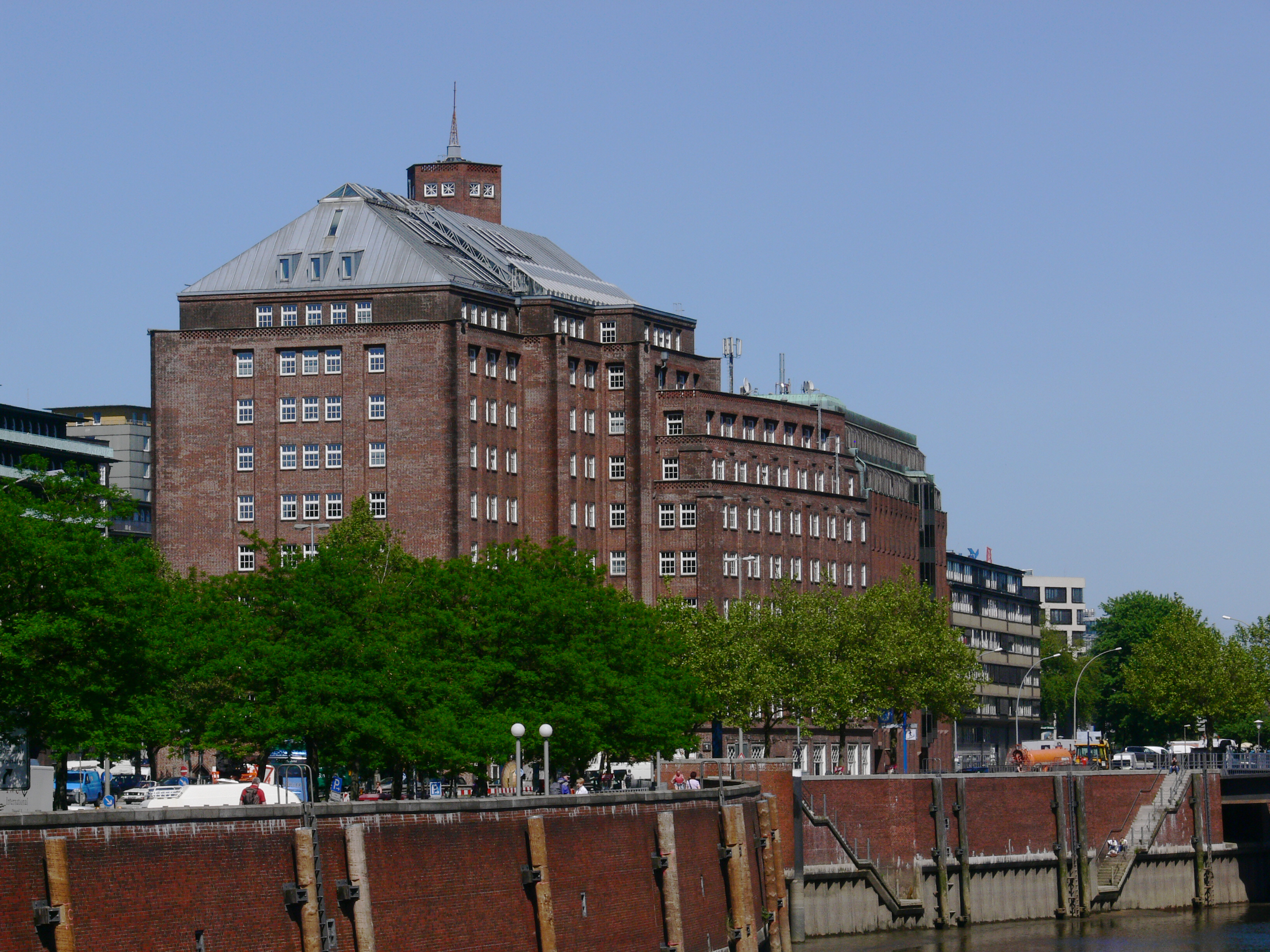 Hamburg, Meßberghof This is a photograph of an architectural monument.